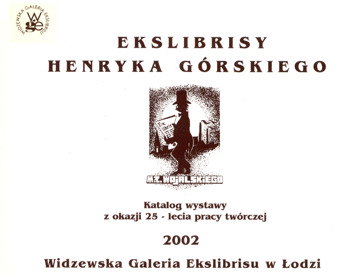 Katalog wystawy ekslibrisów Henryka Górskiego łódzkiego lekarza i twórcy ekslibrisów w 25-lecie pracy twórczej w Widzewskiej Galerii Ekslibrisu w Łodzi